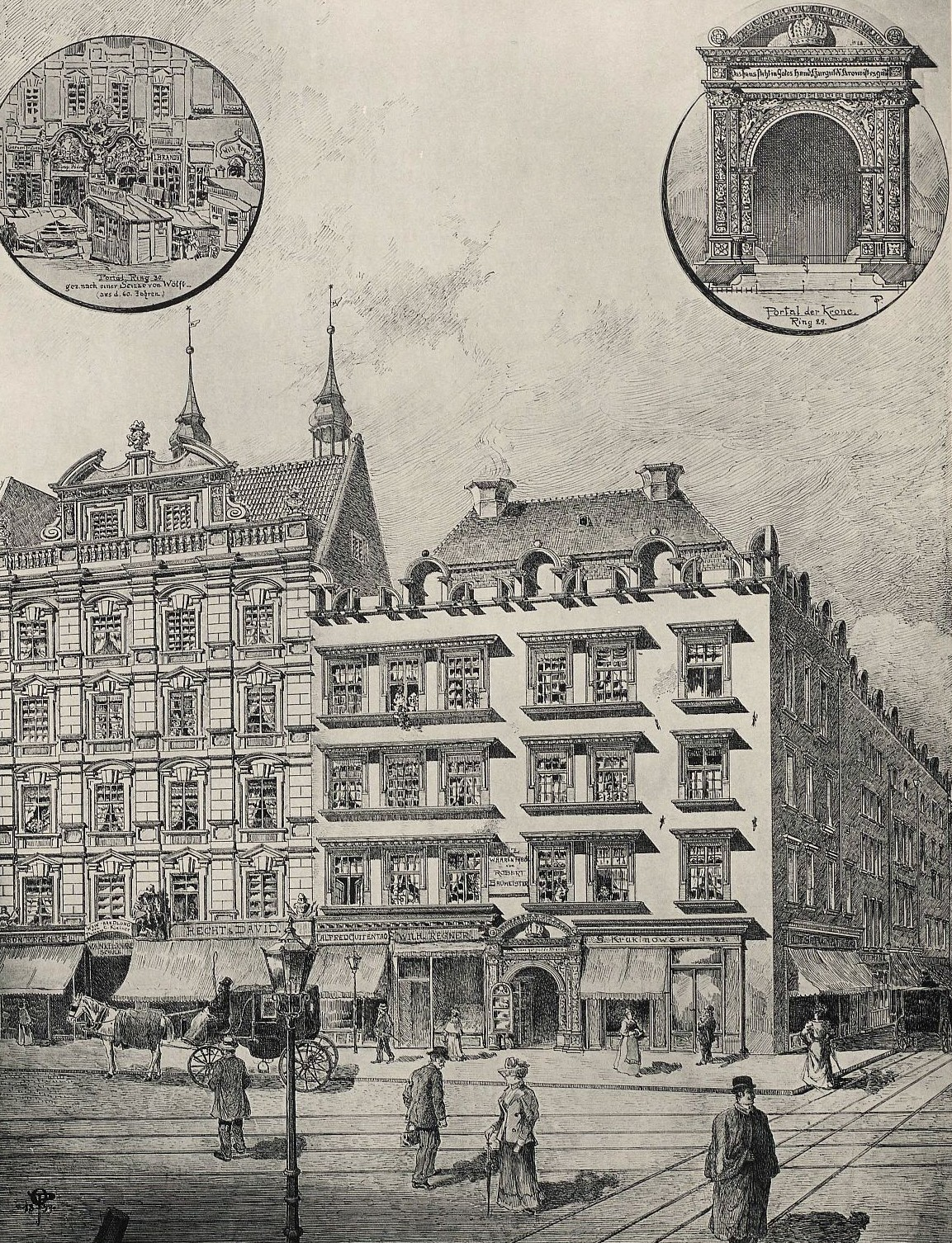 Kamienica Rynek 30 we Wrocławiu przed przebudowa w 1905 roku. (kamienica w środku)